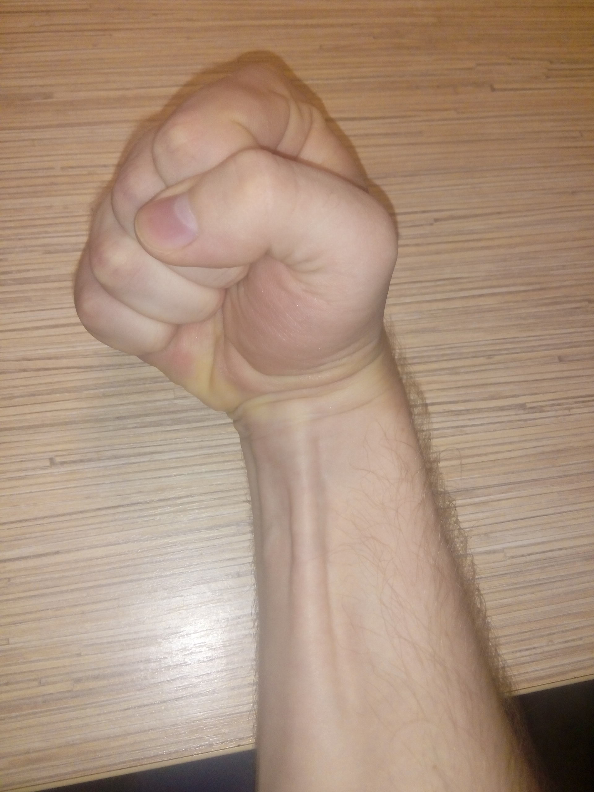 Длинная ладонная мышца